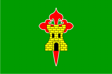 Bandera de Sobrescobio